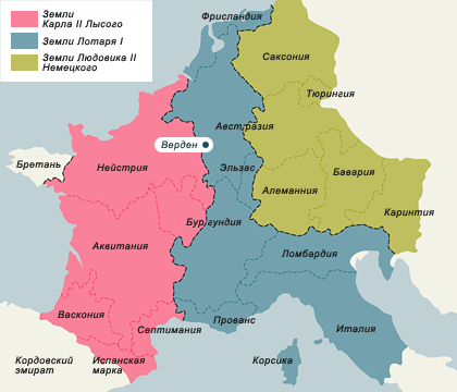 Раздел империи Карла Великого по Верденскому договору.